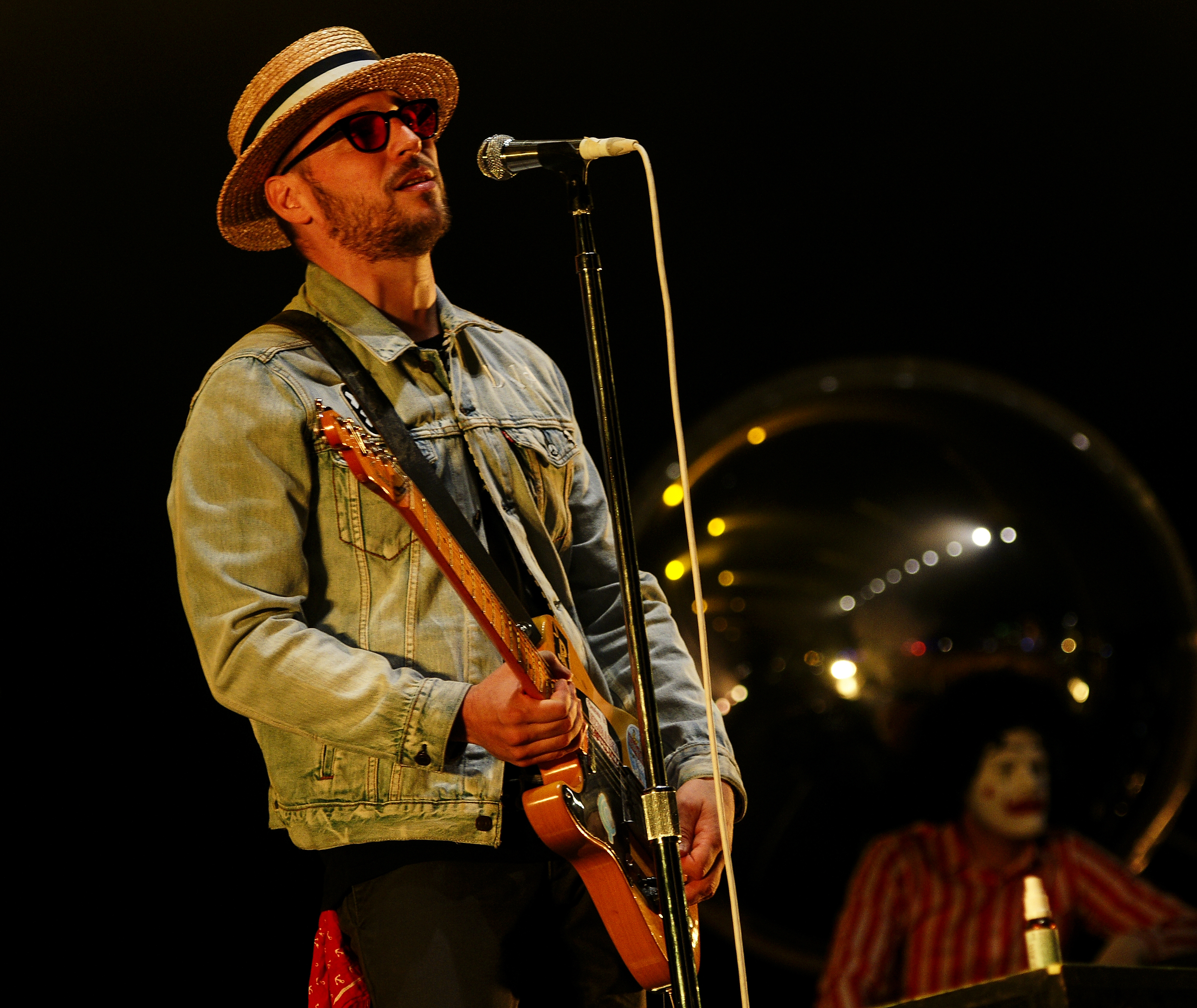 Deichbrandfestival an der Nordsee 2015 Seeflughaven Nordholz Cuxhaven